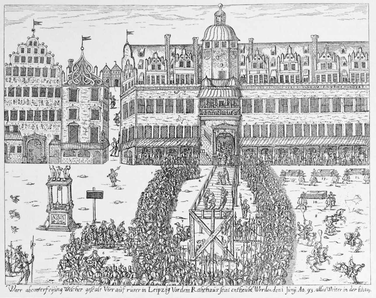 Enthauptung von vier Anführern des Calvinistensturms in Leipzig am 1. Juni 1593,Dabei früheste Abbildung des 1556/57 umgebauten (Alten) Rathauses